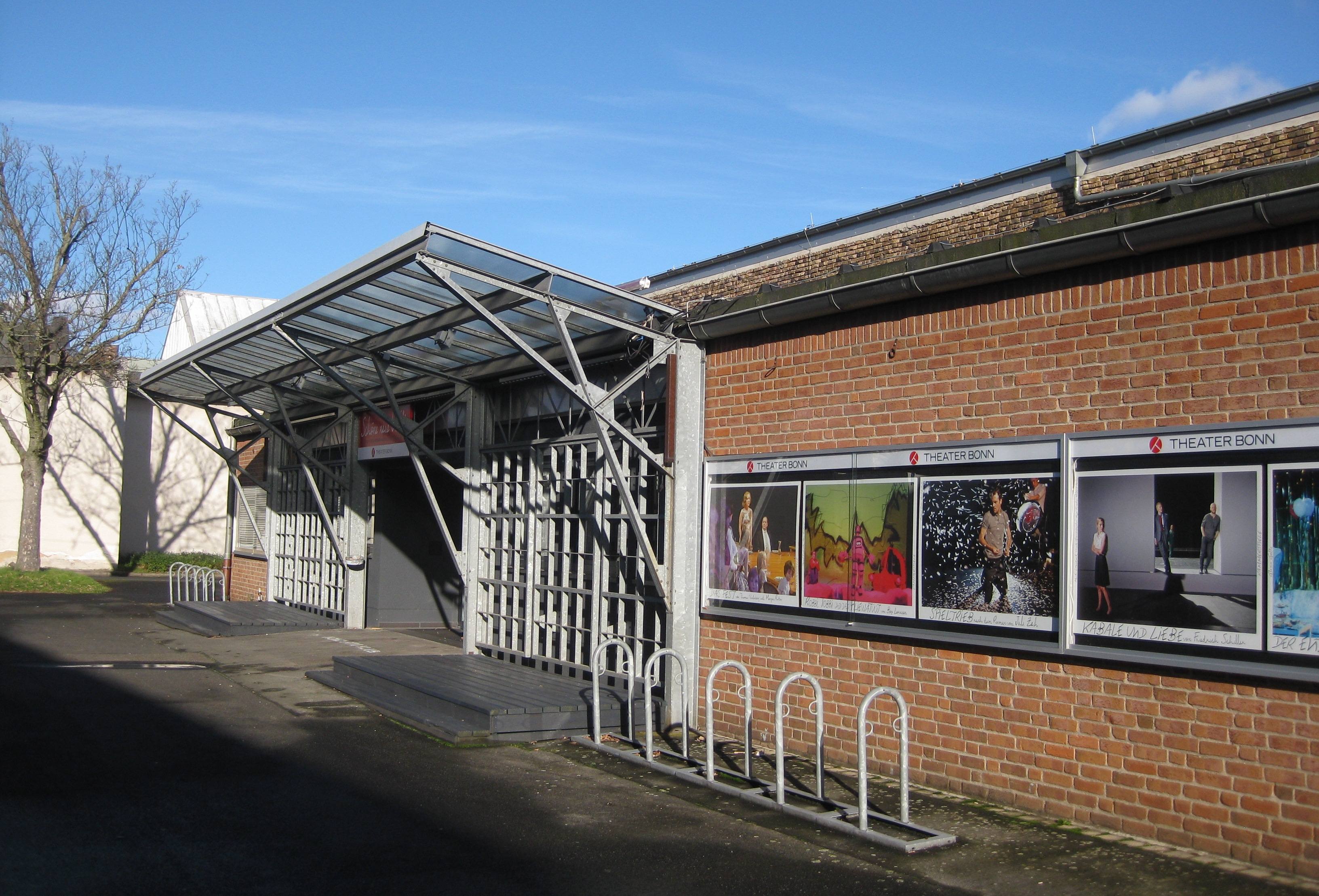 Deutschland, Bonn-Beuel, Siegburger Straße 42 (Bushaltestelle Pantheon Beuel): Halle Beuel auf den als Baudenkmal geschützten Fabrikanlagen einer ehemaligen Jutefabrik (gegr. 1868). Seit 1981 ist das Gelände im Besitz der Stadt Bonn. Zum Zeitpunkt der Aufnahme war das Bonner Theater (Schauspiel & Oper) Nutzer des Hallenkomplexes mit seinen Schauspielhallen; genannt „Halle Beuel“. Dort sind neben Probe- und Aufführungsbühnen auch Verwaltungsbüros, Werkstätten für Bühnenbau, Kostümschneiderei, Maskenbildnerei und Lager untergebracht. Für Publikumsaufführungen wurden drei Hallen genutzt: die eigentliche "Halle Beuel", das "Lampenlager" und der "Alte Malersaal". Auf dem Gelände verfügt auch die Freiwillige Feuerwehr Beuel über Garagen mit Einsatzfahrzeugen und ein Büro.